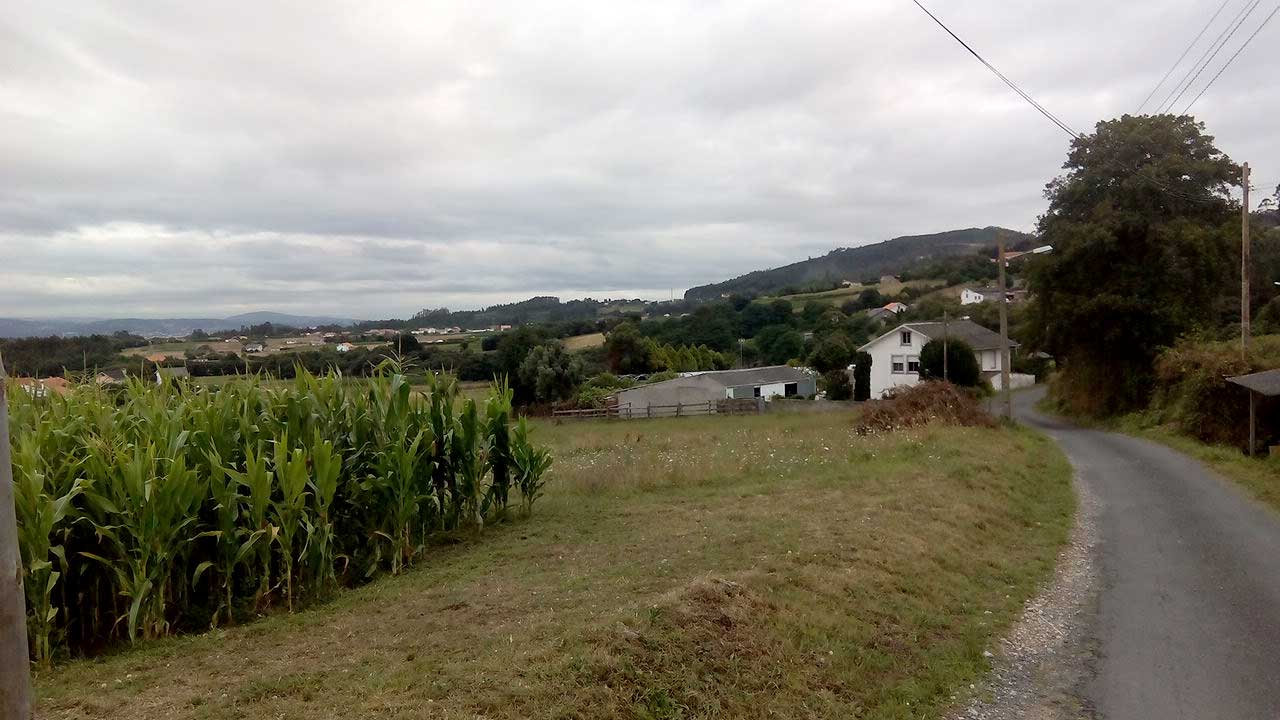 Vista de Cornido, O Val.